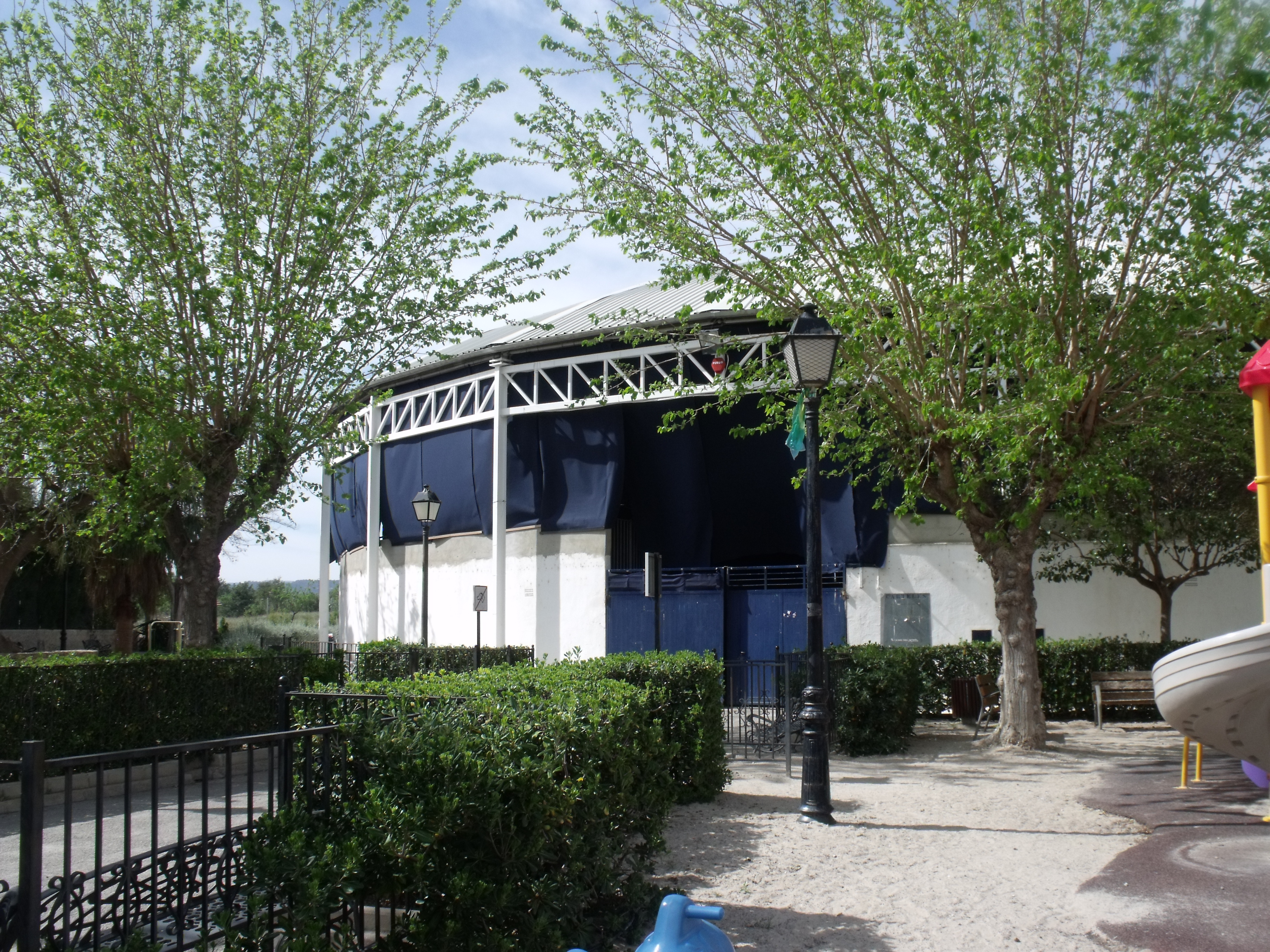 Recinto ferial Gallipatos